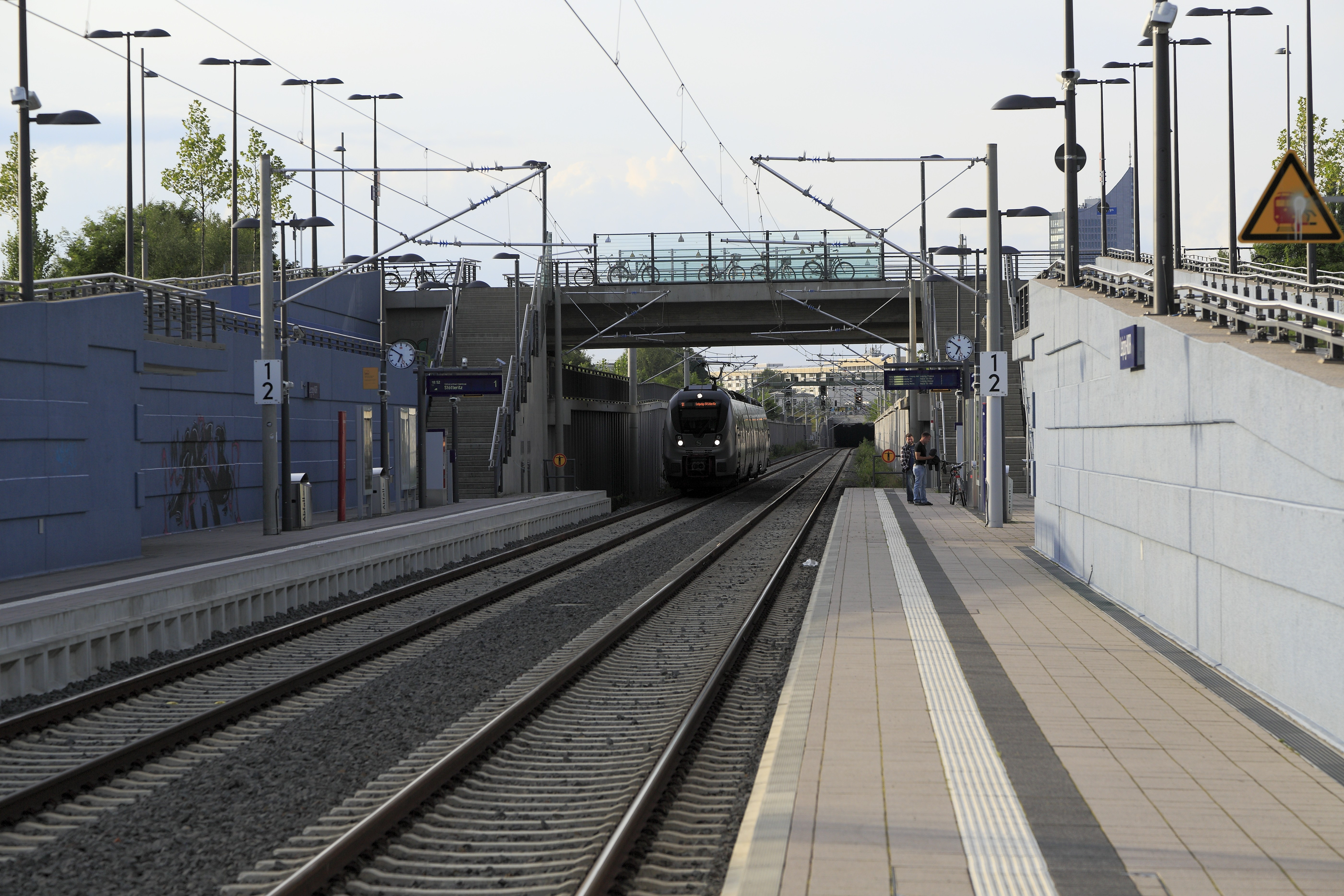 Der Haltepunkt erhielt kurz vor der Inbetriebnahme den neuen Namen »Leipzig MDR«, obwohl es nur eine sichtbeziehung, aber keinen direkten Weg zum MDR-Gelände gibt.Die Außenbahnsteige sind bei einem Halt an einer Streckenverzweigung ausgesprochen ungeschickt, zumal beim Umsteigen in Leipzig Bayer Bf wichtige Anschlüsse nicht erreicht werden können. Platzmangel für den Bau eines Inselbahnsteiges besteht jedenfalls nicht.